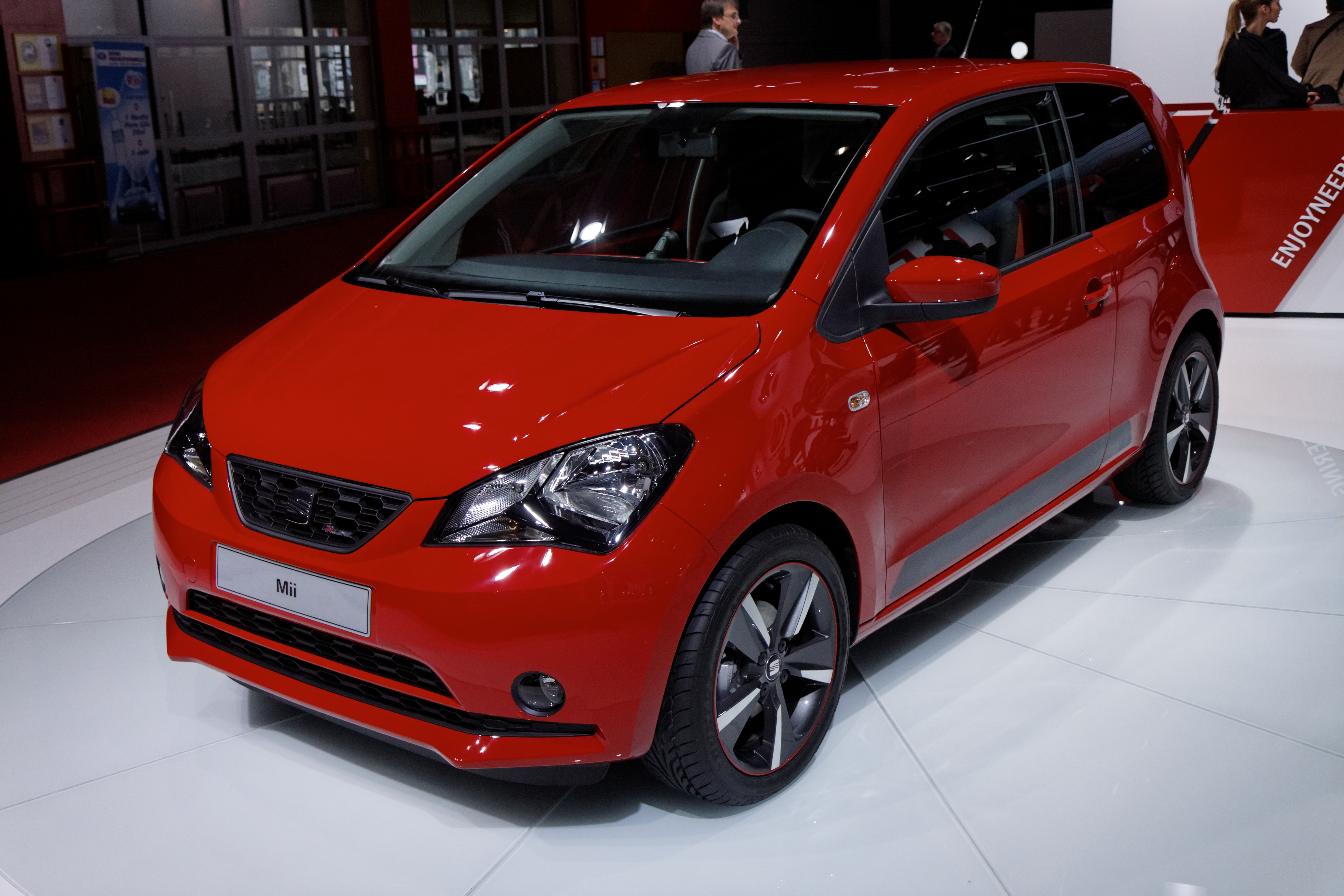 Une Seat Mii présentée lors du Mondial de l'Automobile de Paris 2012.